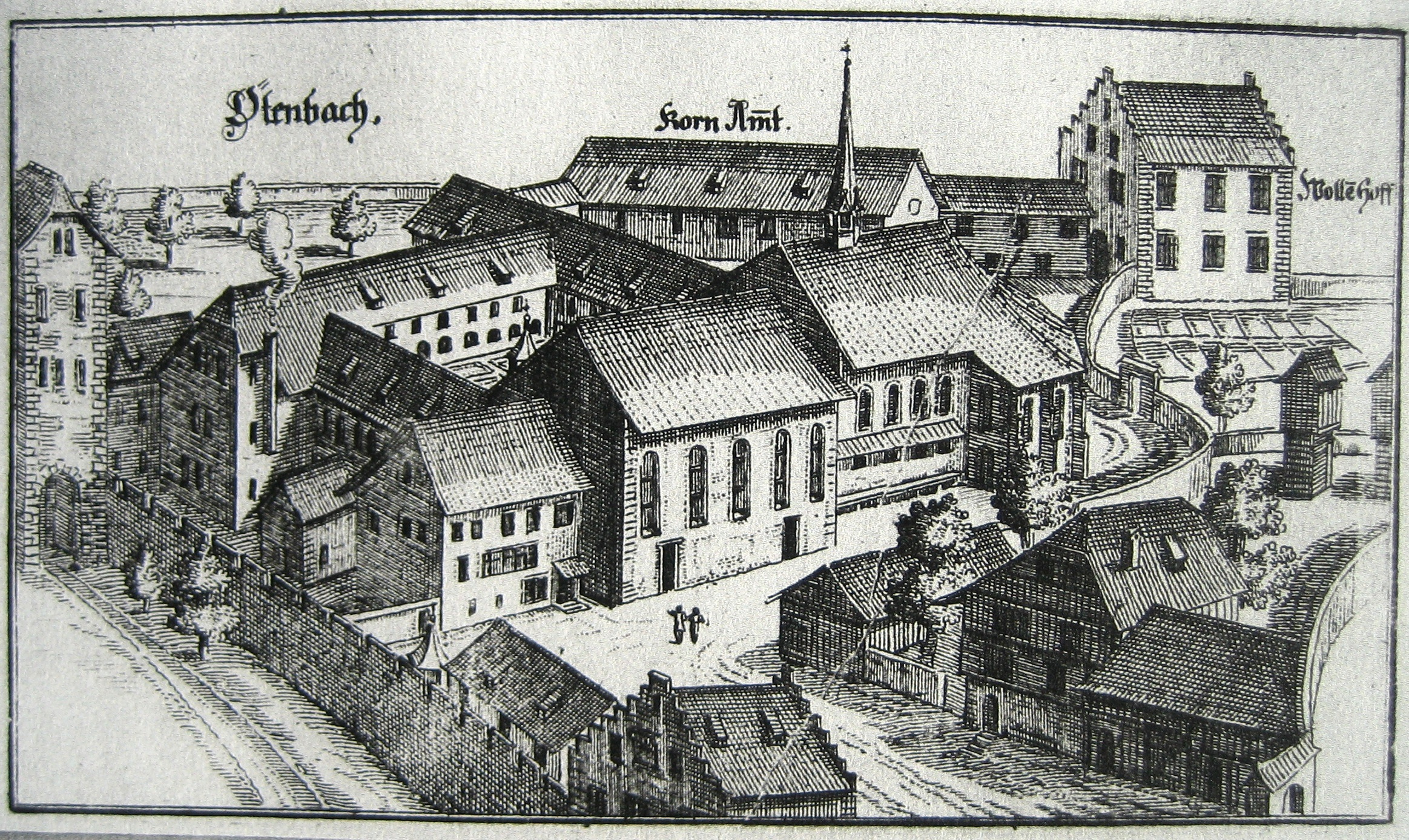 Kloster Oetenbach 1705, Blick nach Osten; Zeichnung von Johann Melchior Füssli